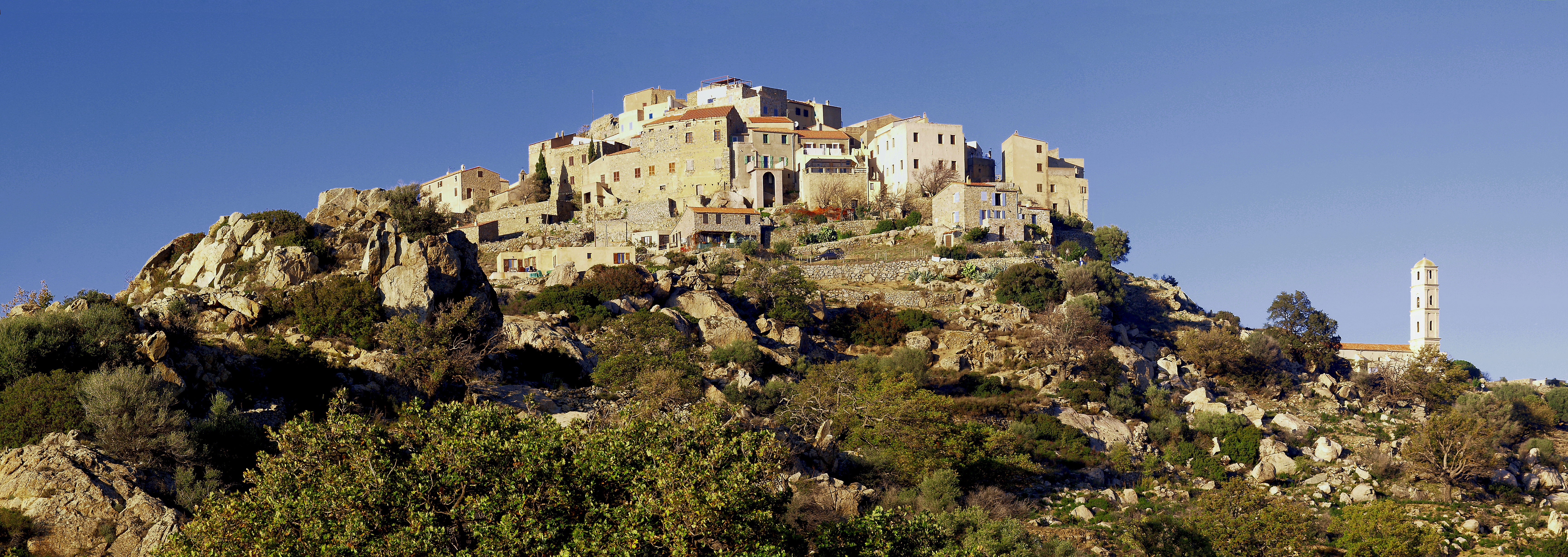 Sant'Antonino - Panorama